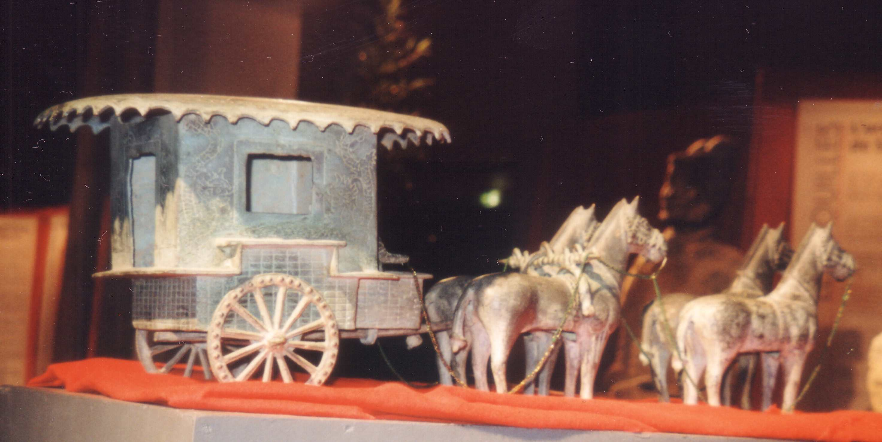 Char en bronze du Mausolée de l'empereur Qin à la Foire Exposition de Toulouse 2008.